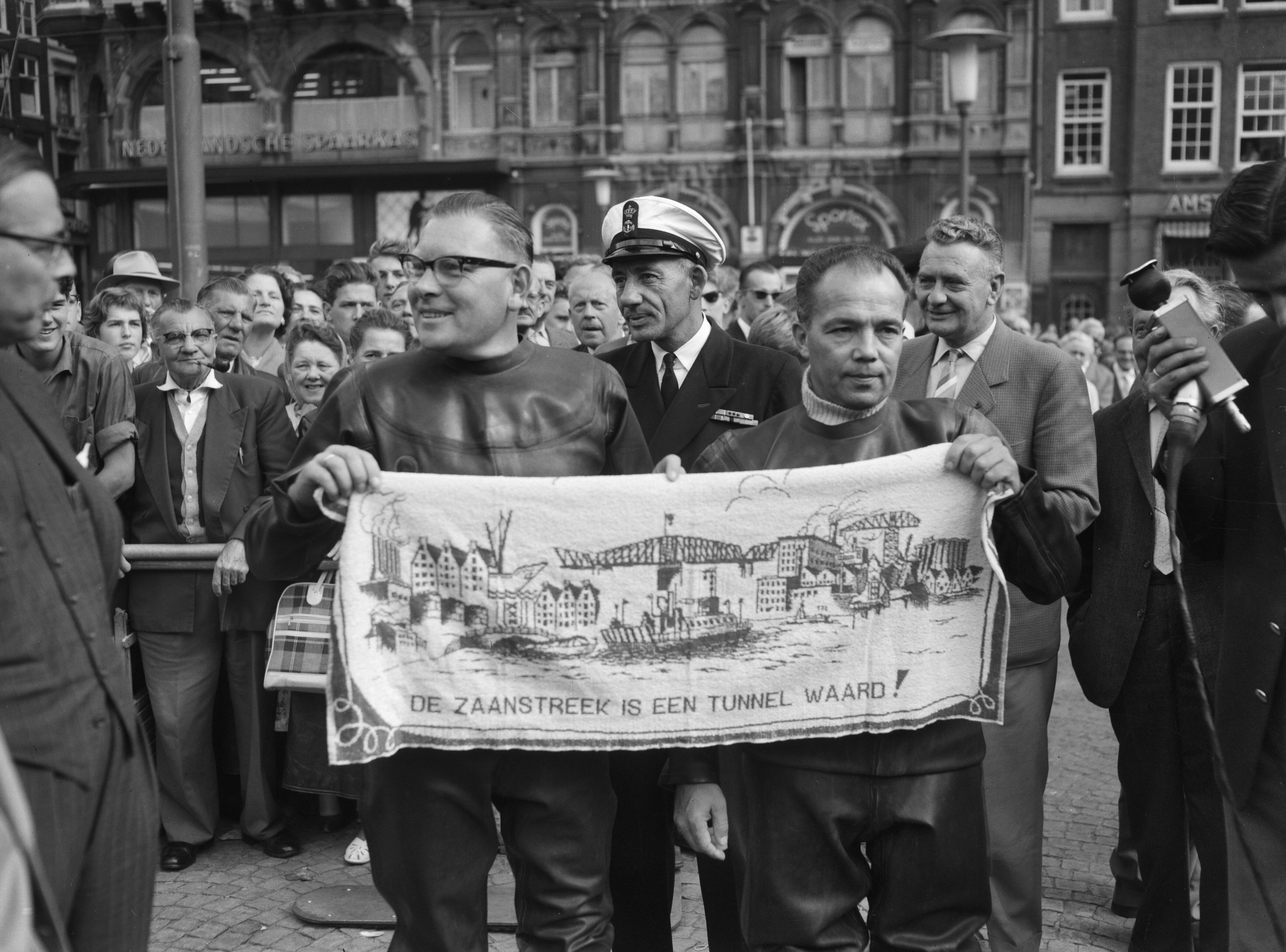 Collectie / Archief : Fotocollectie Anefo Reportage / Serie : [ onbekend ] Beschrijving : Dam tot Dam race , eerste dag. Burgemeester Franken van Zaandam en radio-reporter Dick van Rijn maken de tocht als kikvorsmannen, en zullen het Noordzeekanaal op de plaats waar de Coentunnel is geprojecteerd op de bodem van het kanaal oversteken. Annotatie : Op 27 augustus 1959 werd de allereerste Dam-Dam-race gehouden. Het evenement was een initiatief van de gemeentebesturen van Amsterdam en Zaandam als een ludieke protestactie tegen de gebrekkige verbinding tussen Amsterdam en Zaandam. Zij wilden zo druk uitoefenen op de rijksoverheid om de Coentunnel snel te realiseren. De deelnemers moesten een parcours van de Zaanse Dam naar de Amsterdamse Dam afleggen, waarbij alle mogelijke voer- en vaartuigen geoorloofd waren. Aan de race deden vele prominenten mee, zoals de zangeres Teddy Scholten, dichter Simon Vinkenoog en tekenaar Opland. De jonge radioverslaggever Kees Buurman liet zich per motor en helikopter vervoeren en verzorgde de hele dag meeslepende radioreportages. Winnaar werd de 32-jarige Wout Bruynzeel met een tijd van 10.25. Hij maakte gebruik van de speedboot van de Duitse miljonair Herbert Dinkheller uit Essen. Datum : 27 augustus 1959 Locatie : Amsterdam, Noord-Holland, Noord-HollandAmsterdam Trefwoorden : burgemeesters, journalisten, wedstrijden Persoonsnaam : Rijn, Dick van Fotograaf : Noske, J.D. / Anefo Auteursrechthebbende : Nationaal Archief Materiaalsoort : Negatief (zwart/wit) Nummer archiefinventaris : bekijk toegang 2.24.01.04 Bestanddeelnummer : 910-6167